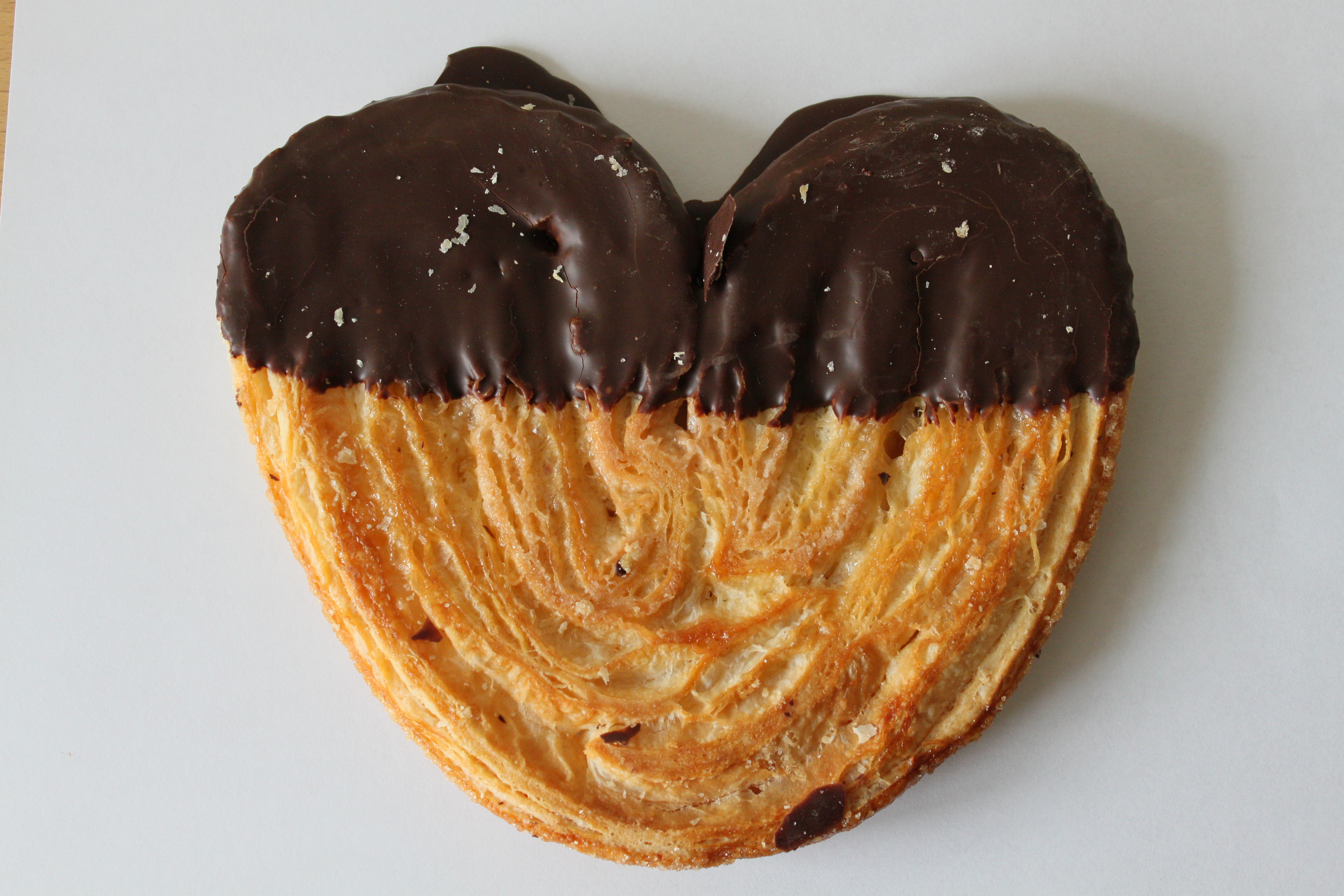 Kuchen im Schokoladenmuseum Köln; 2011